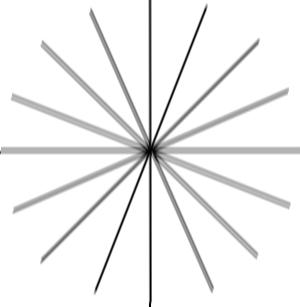 Мира с искажениями, характерными для астигматизма. Изображение нарисовано для иллюстрации статьи про астигматизм в офтальмологии.